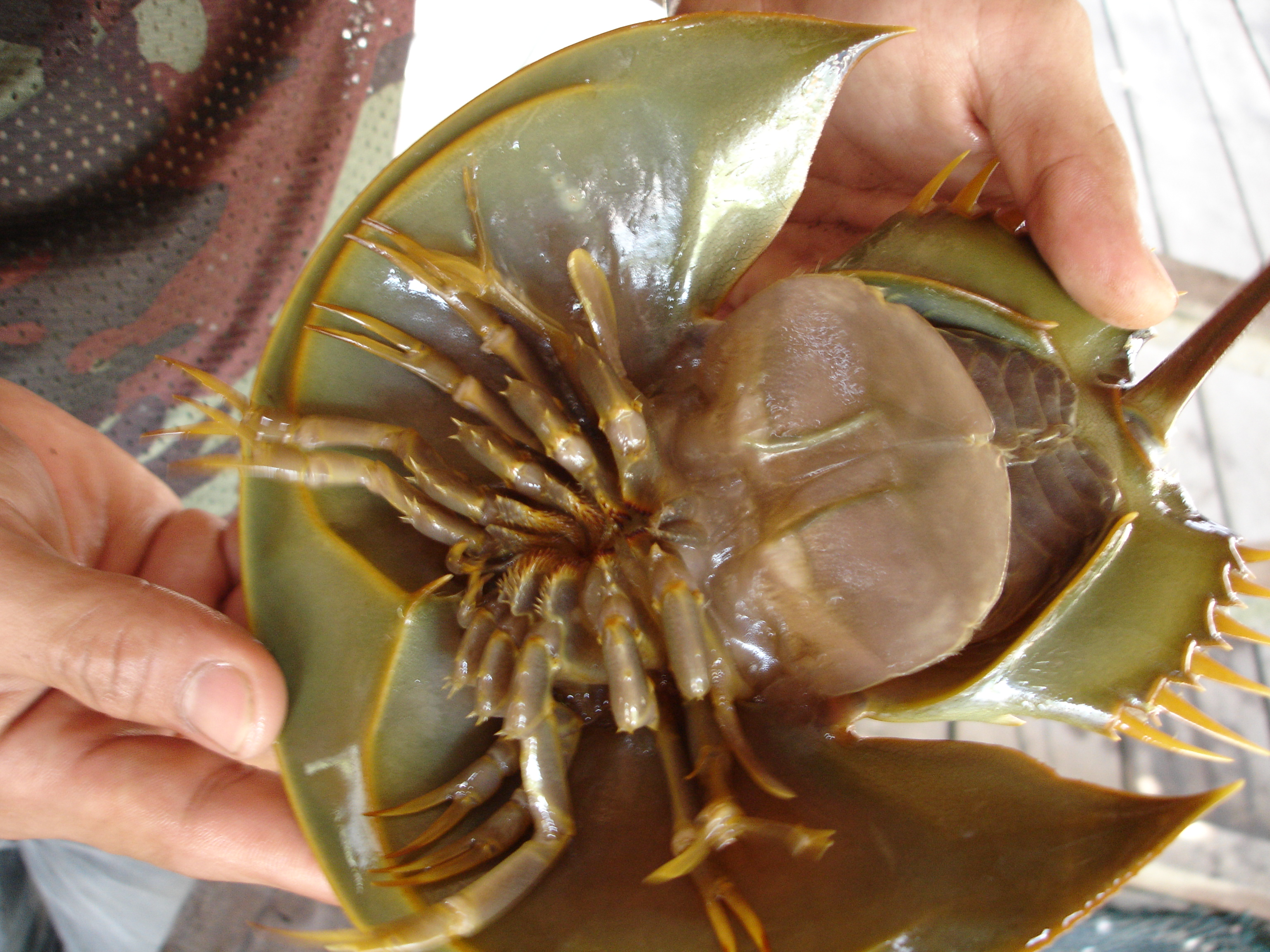 Limule.